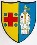 Armoiries de la commune de Chézard-Saint-Martin, Val-de-Ruz. Auteur : Gérard Crameri